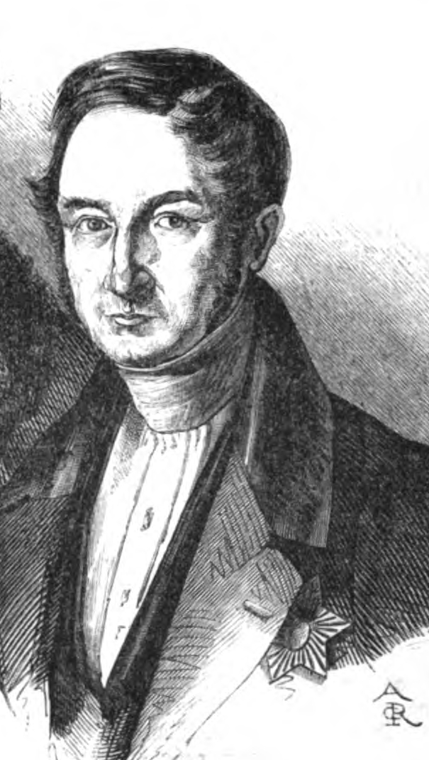 Karl du Thil, hessischer Staatsminister.